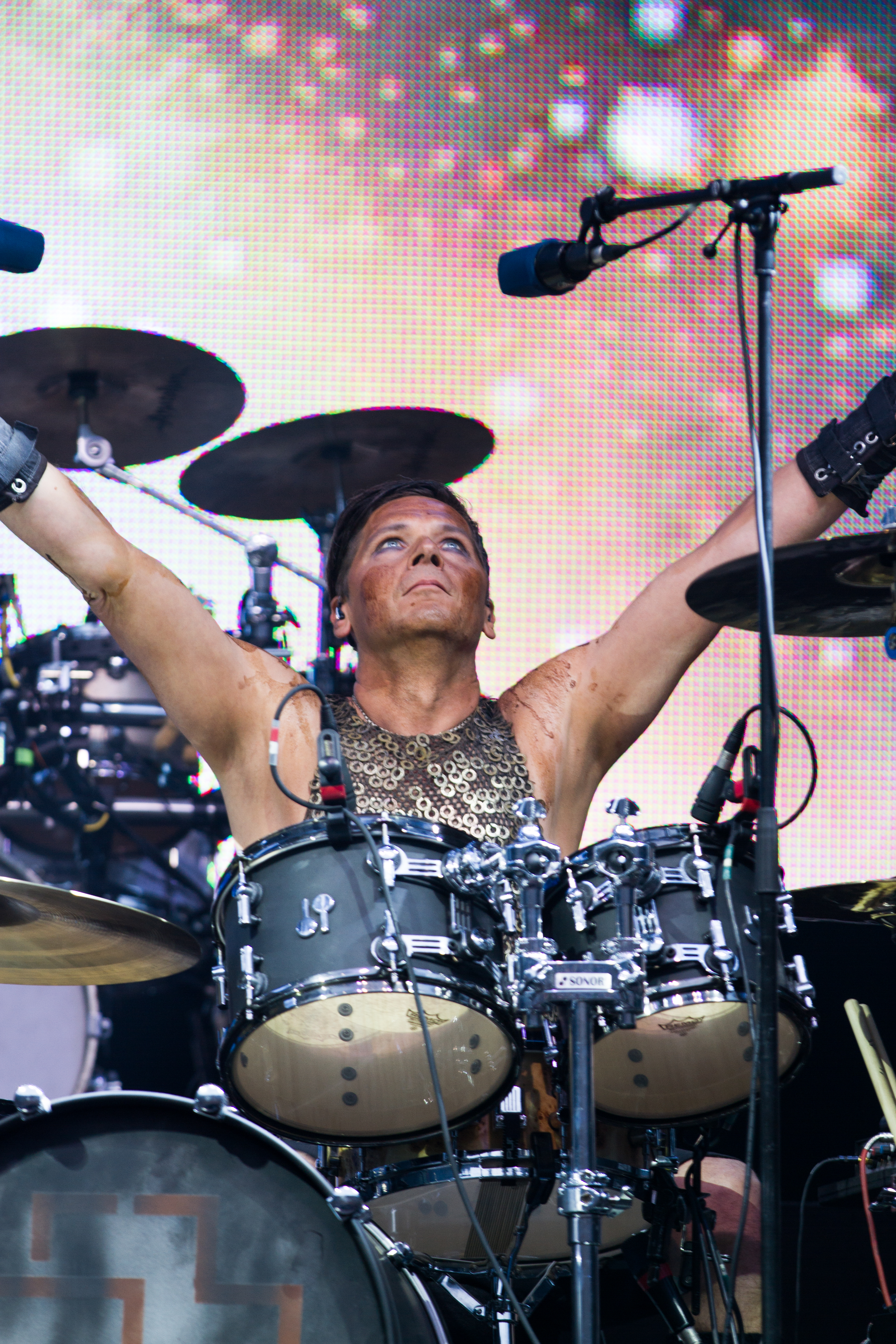 Christoph Schneider Schlagzeuger der Band Rammstein beim "Karat 40 Jahre KARAT - Das EINZIGE Jubiläumskonzert" in der Berliner Waldbühne am 20.06.2015